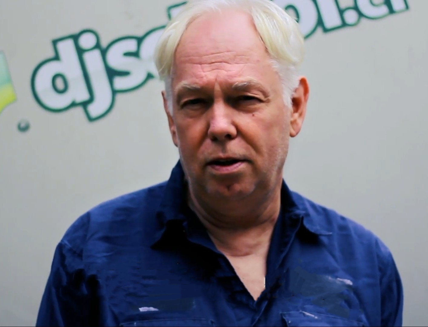 Dimitri Hegemann - Visita DJ School